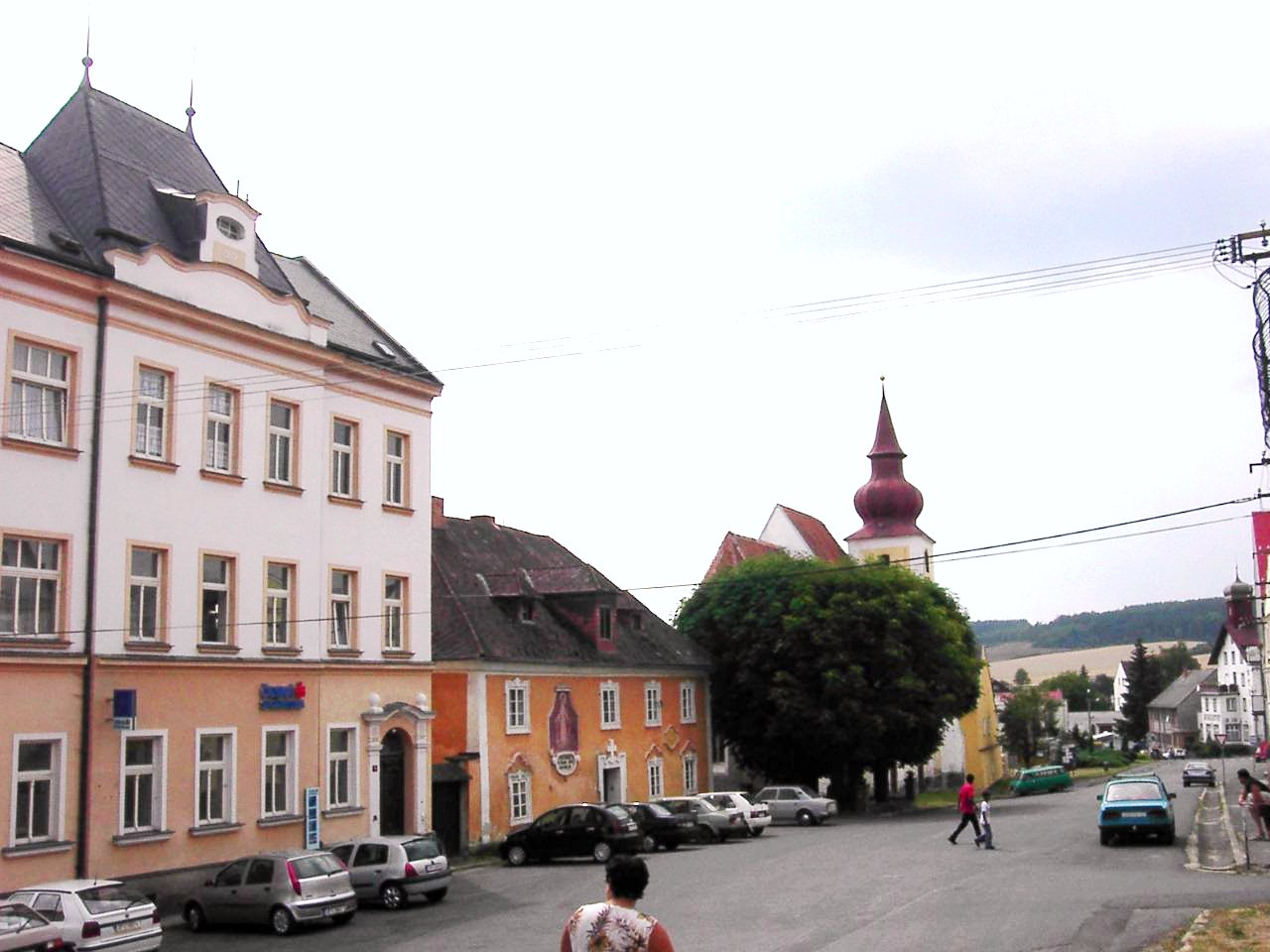 Barokní kostel, fara a budova České spořitelny na poběžovickém náměstí.